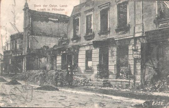 Pilkallen Kriegszerstörungen im 1. Weltkrieg